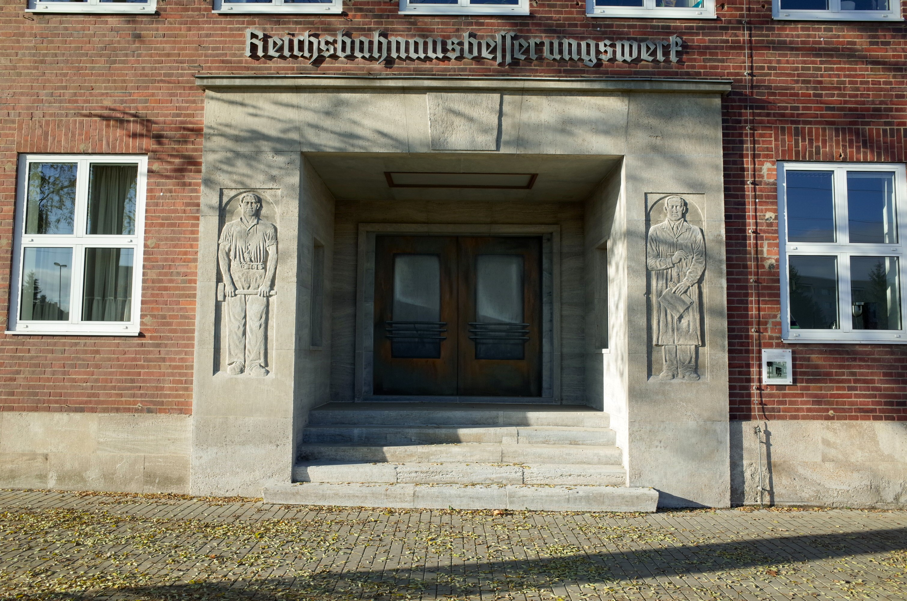 Reichsbahnausbesserungswerk Dessau. Der 2014 restaurierte historische Eingang zum Werk.